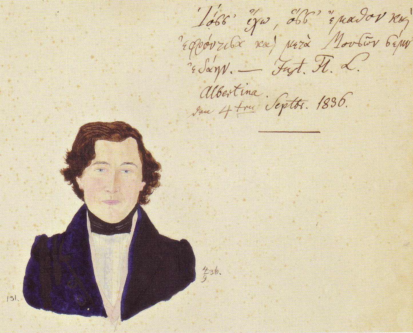 Farbige Porträtzeichnung von Justus Florian Lobeck als Student der Universität Königsberg i. Pr. aus dem Album amicorum von Lobecks Kommilitonen Wilhelm Schmiedeberg. Die von Schmiedeberg angefertigte Zeichnung wird durch ein von Lobeck eigenhändig eingetragenes griechisches Motto ergänzt (unterzeichnet: Just.[us] Fl.[orian] L.[obeck) / Albertina. / den 4ten Sept[em]b[e]r. 1836.). Die Quelle des griechischen Zitats ist Diogenes Laertios, Buch 6, Kapitel 5. Das dort dem Krates zugeschriebene Distichon lautet vollständig: ταῦτ᾽ ἔχω ὅσσ᾽ ἔμαθον καὶ ἐφρόντισα καὶ μετὰ Μουσῶν σέμν᾽ ἐδάην: τὰ δὲ πολλὰ καὶ ὄλβια τῦφος ἔμαρψεν. Fritz Jürß (Reclam 1998) übersetzt es folgendermaßen: „Das, was ich weiß und erdacht und mit Hilfe der Musen ergründet, ist mein Besitz; bloßer Dunst dagegen der übrige Reichtum.“ Den Anfang des Satzes hat Lobeck leicht variiert („Τόσσ᾽ ἔχω...“), den zweiten Halbvers weggelassen.